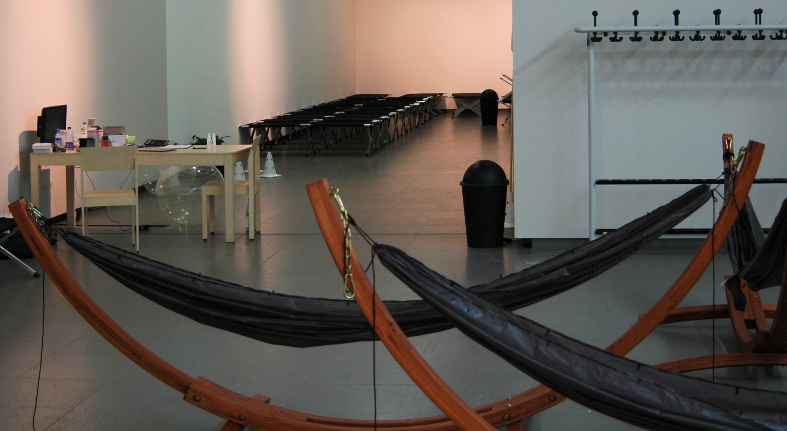 NRW-FORUM DÜSSELDORF, META Marathon, Ruheraum